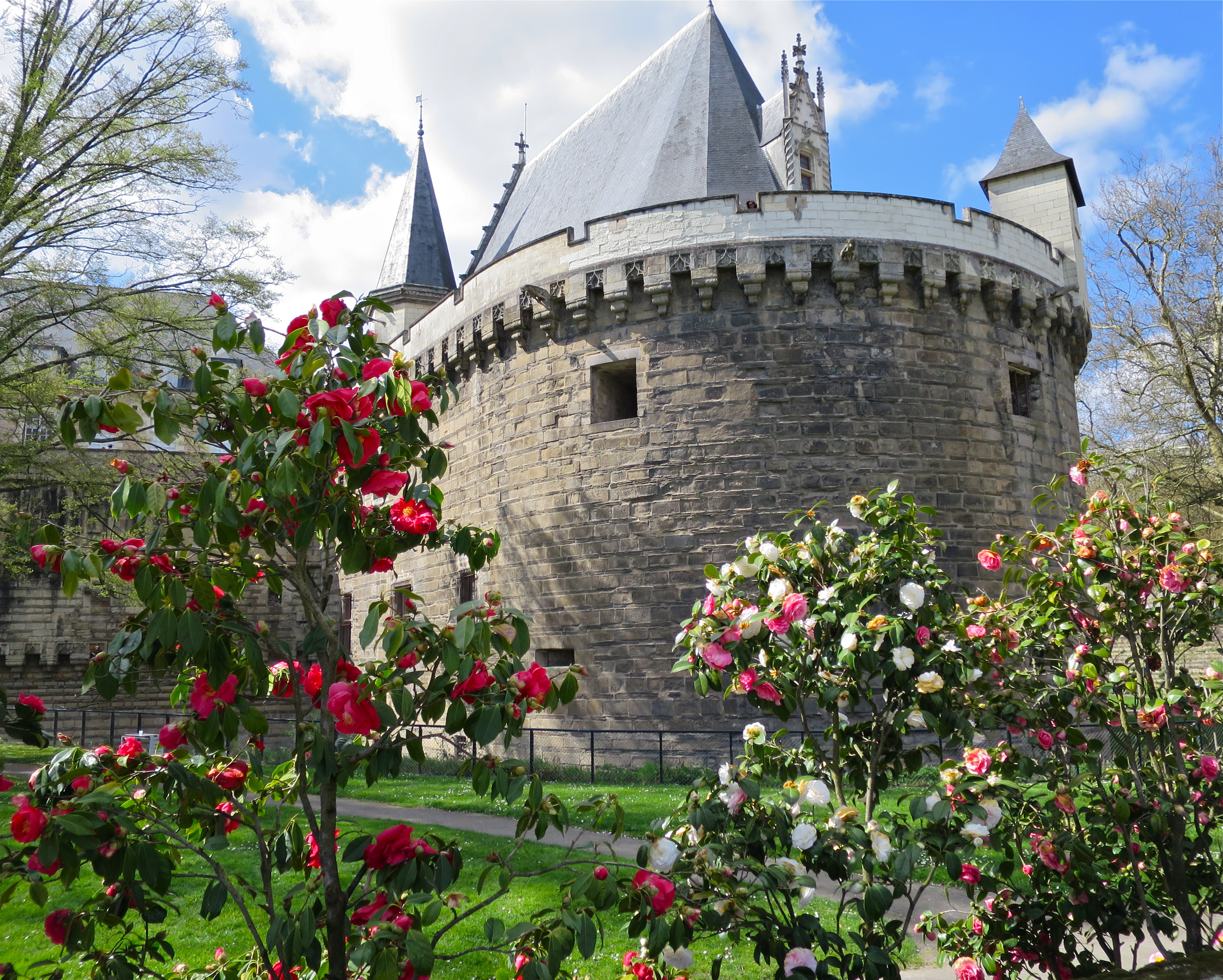 Château des ducs de Bretagne .